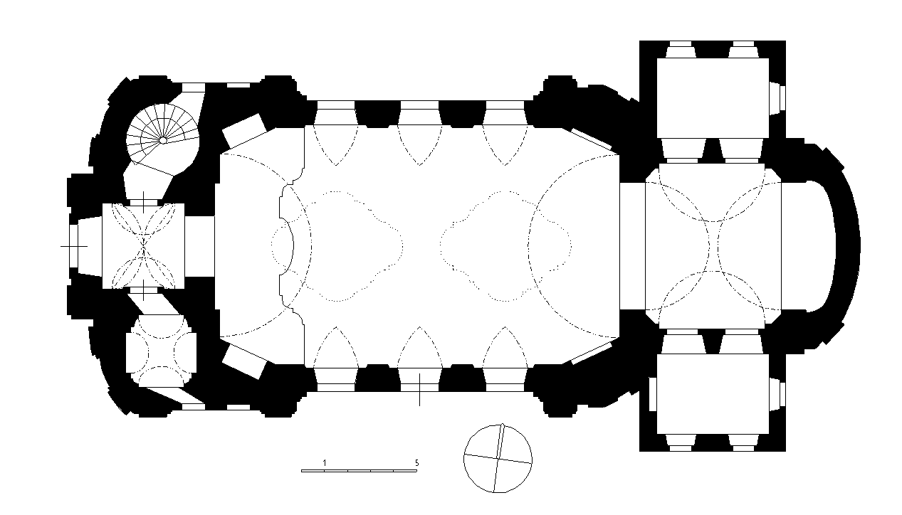 Půdorys kostela svatého Jana Křitele v Osově (okres Beroun). Autoři achitektonického návrhu kostela jsou Bartolomeo Scotti a Anselmo Martino Lurago